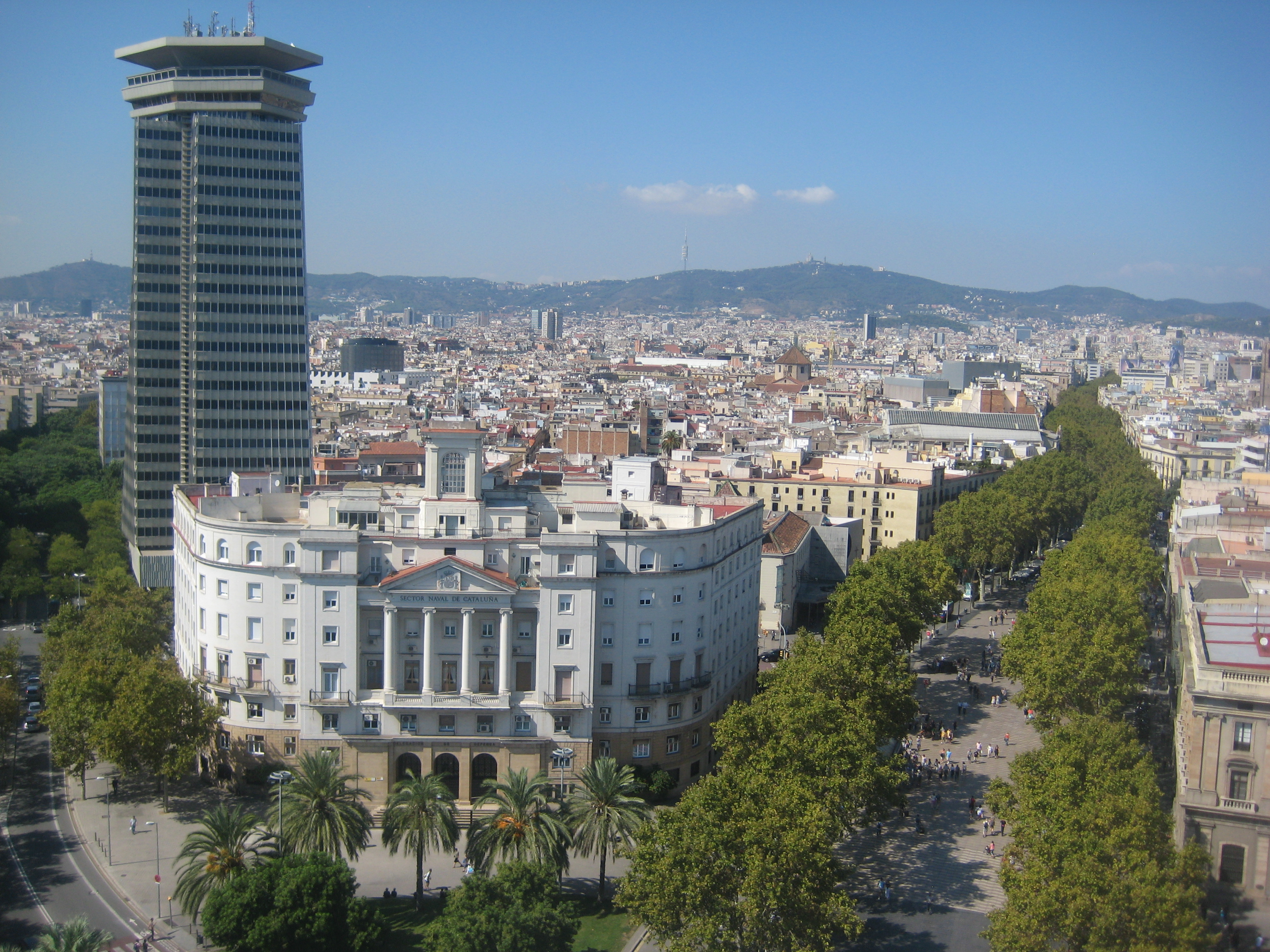 Барселона, вид на Рамблу с колонны Колумба